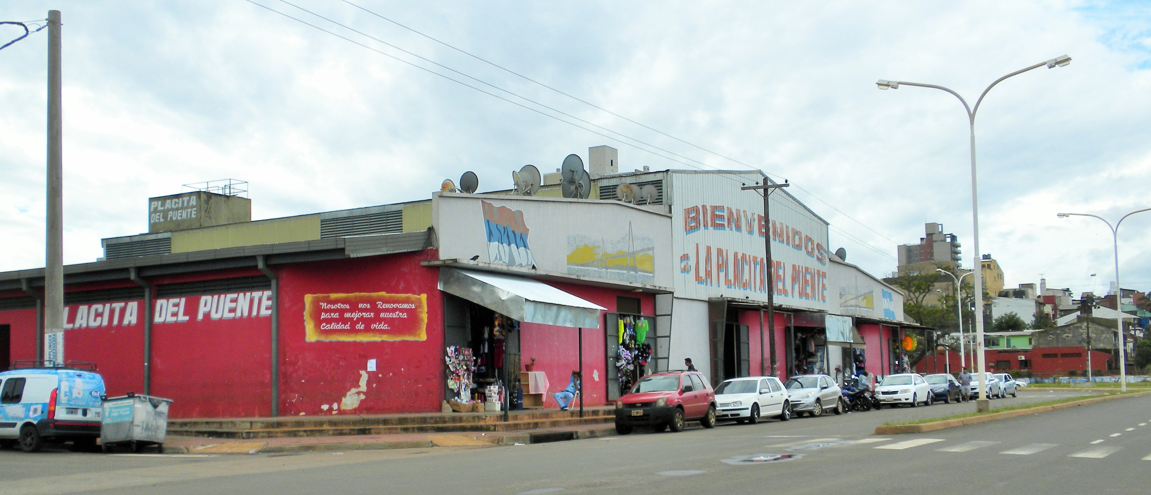 Mercado La Placita del Puente - Posadas, Provincia de Misiones, Argentina. Fuenteː Periodista Horacio Cambeiro.